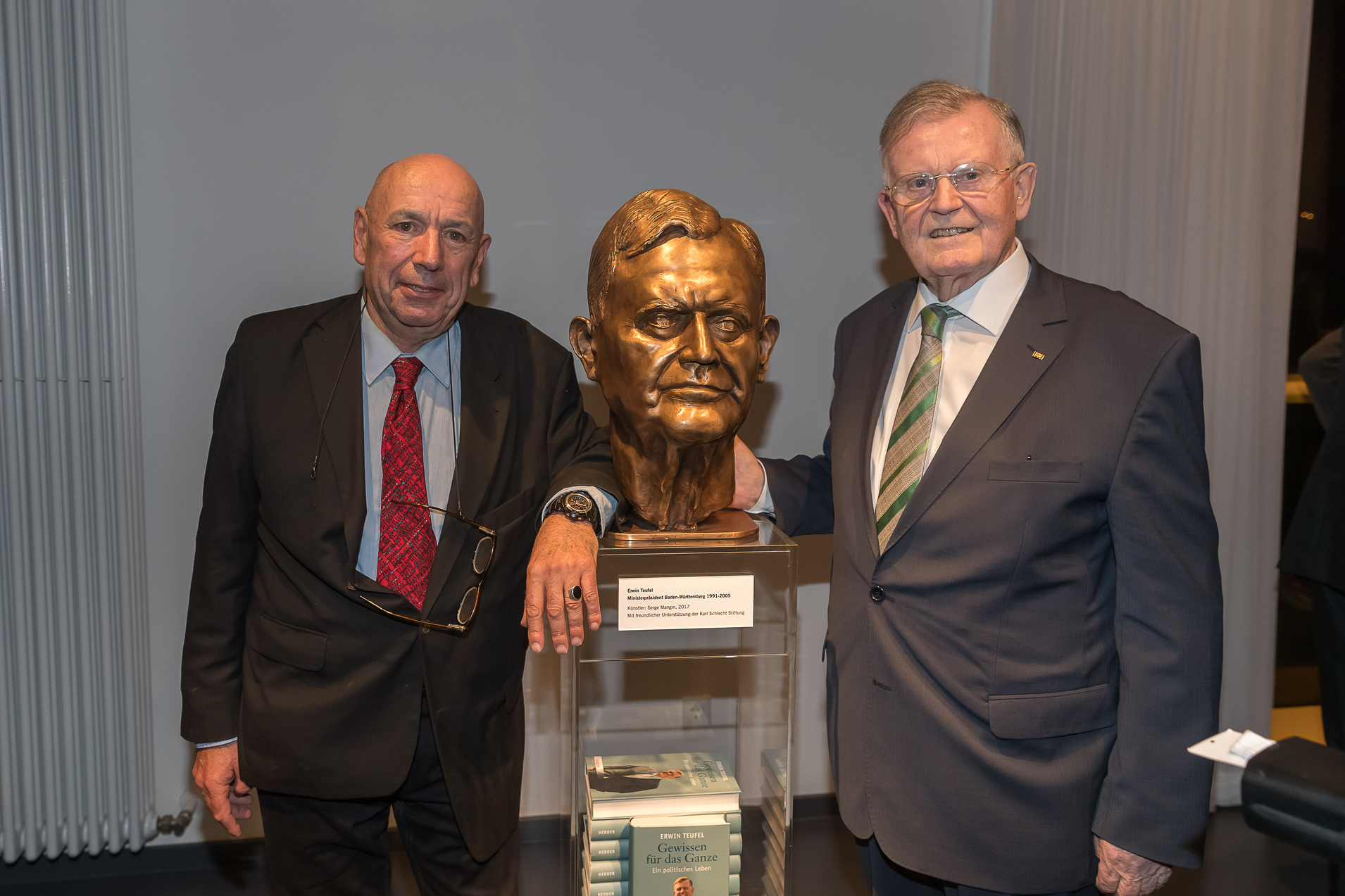 Fotografie von Serge Mangin mit Erwin Teufel und seiner neuen Bronzebüste.